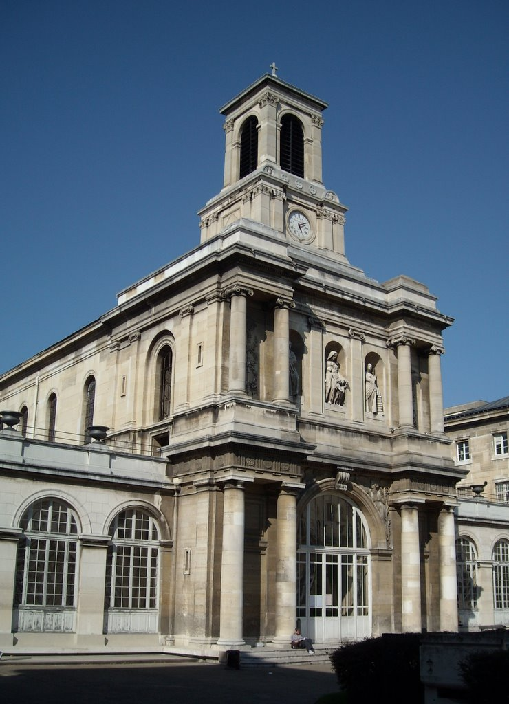 Chapelle de l'hôpital de Lariboisière